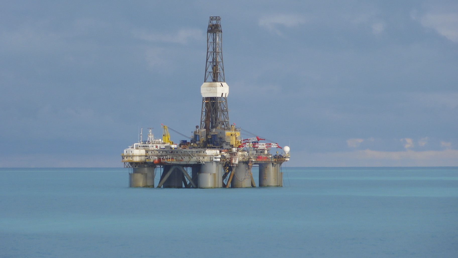 GA3